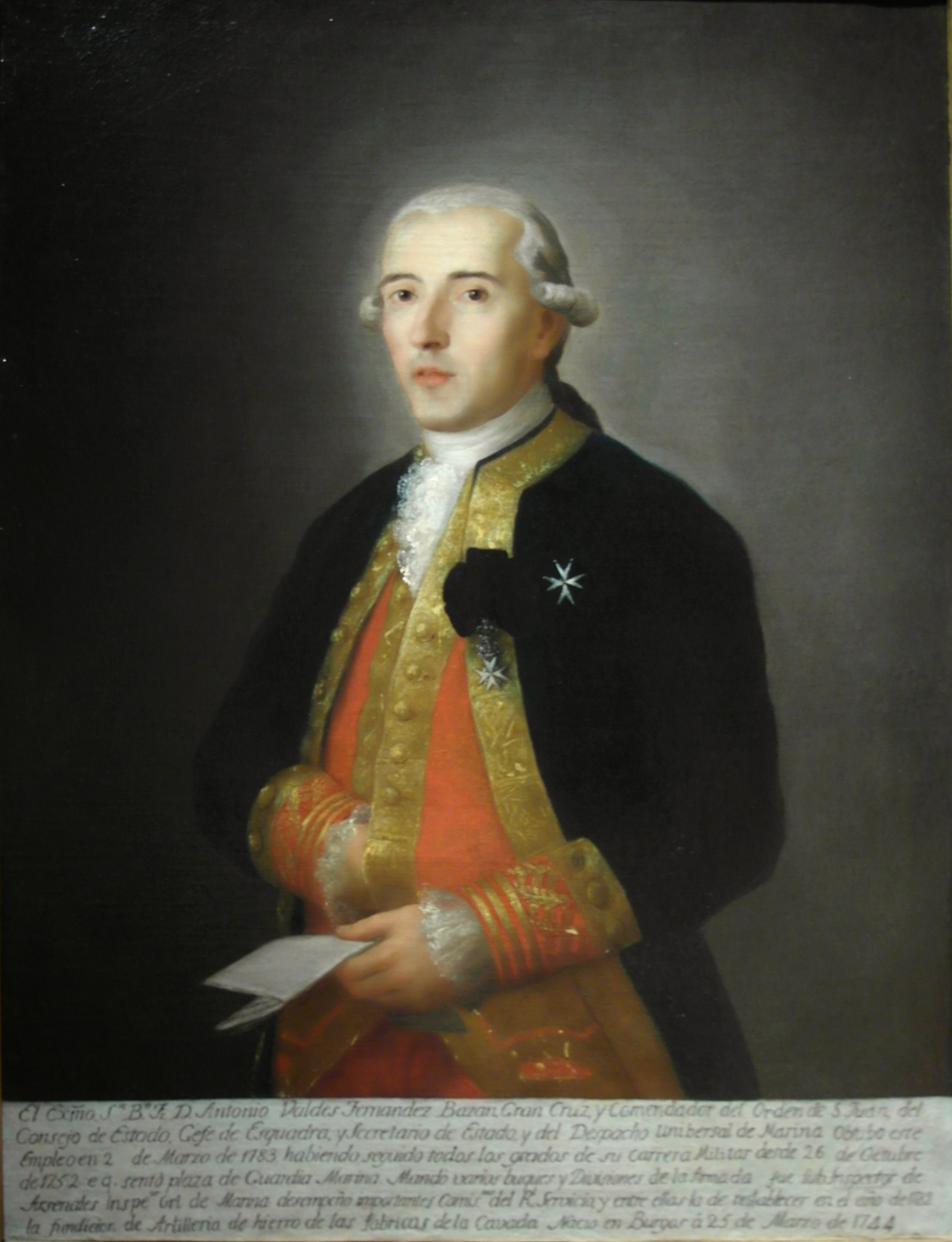 Retrato del marino español Antonio Valdés y Fernández Bazán (1744-1816), que fue capitán general de la Real Armada Española y también secretario de Estado y del Despacho Universal de Marina. Esta obra, que es una copia realizada posiblemente en 1828 por Rafael Tejeo a partir de un original de hacia 1788, ingresó en el Museo Naval de Madrid en 1844, procedente de la Secretaría de Marina, y fue restaurada en 1993. Además, el retratado aparece de pie y vistiendo uniforme grande de jefe de escuadra de la Real Armada Española, junto con la cruz y la venera de caballero de la Orden de Malta, aunque los tres galones que luce en las bocamangas de su uniforme y que eran privativas de los directores generales de la Armada, fueron añadidas por el copista en 1828.